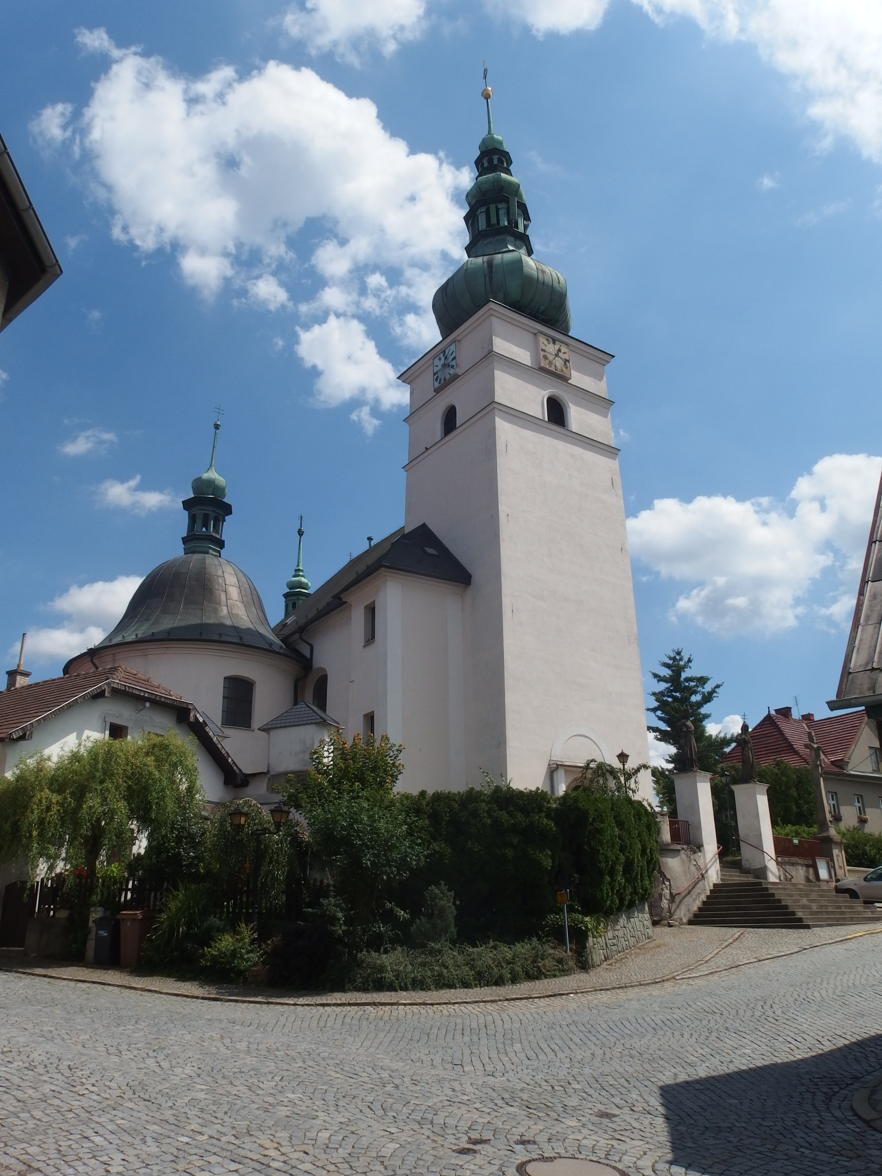 Brušperk